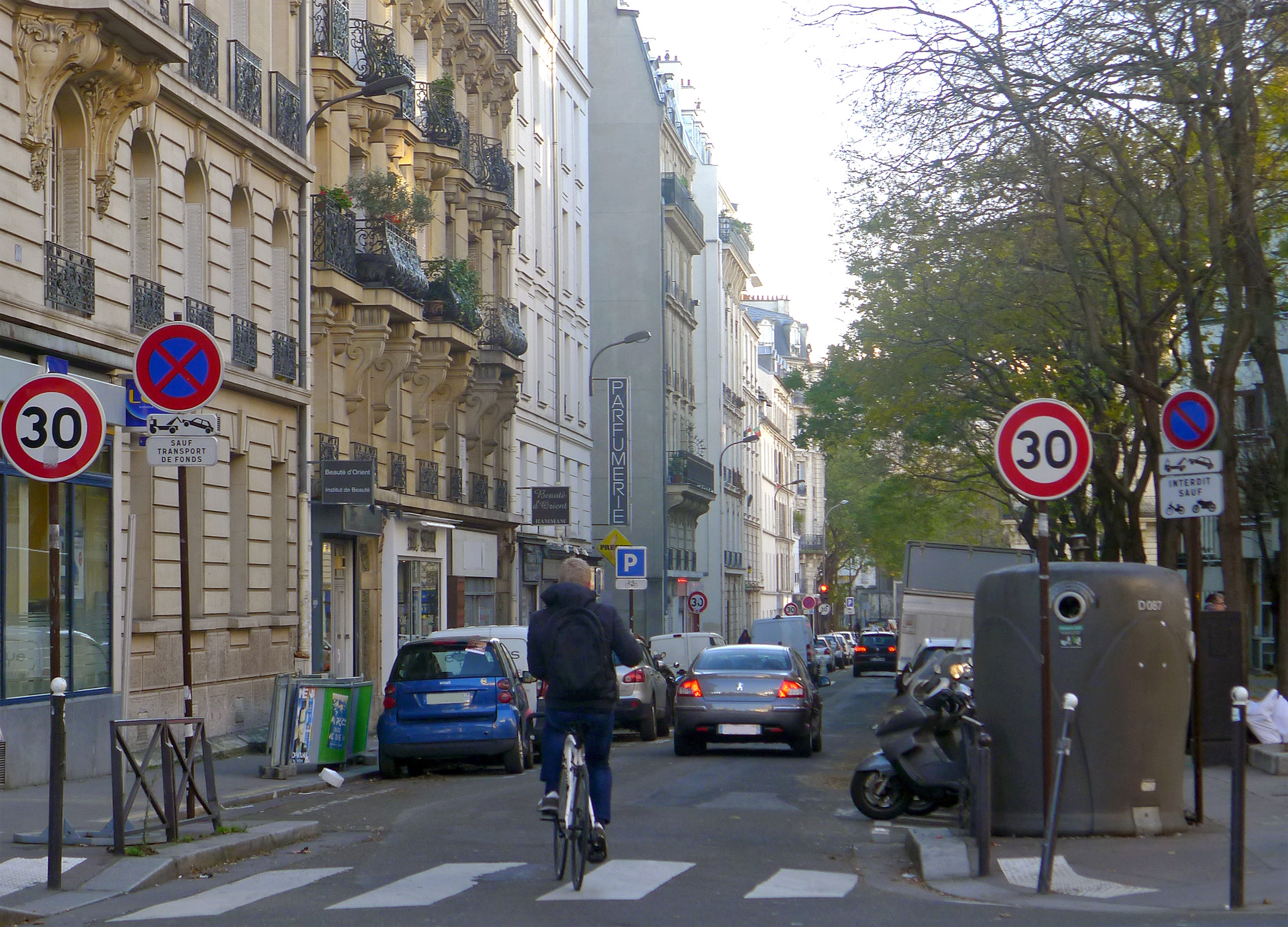 Rue Mademoiselle - Paris XV